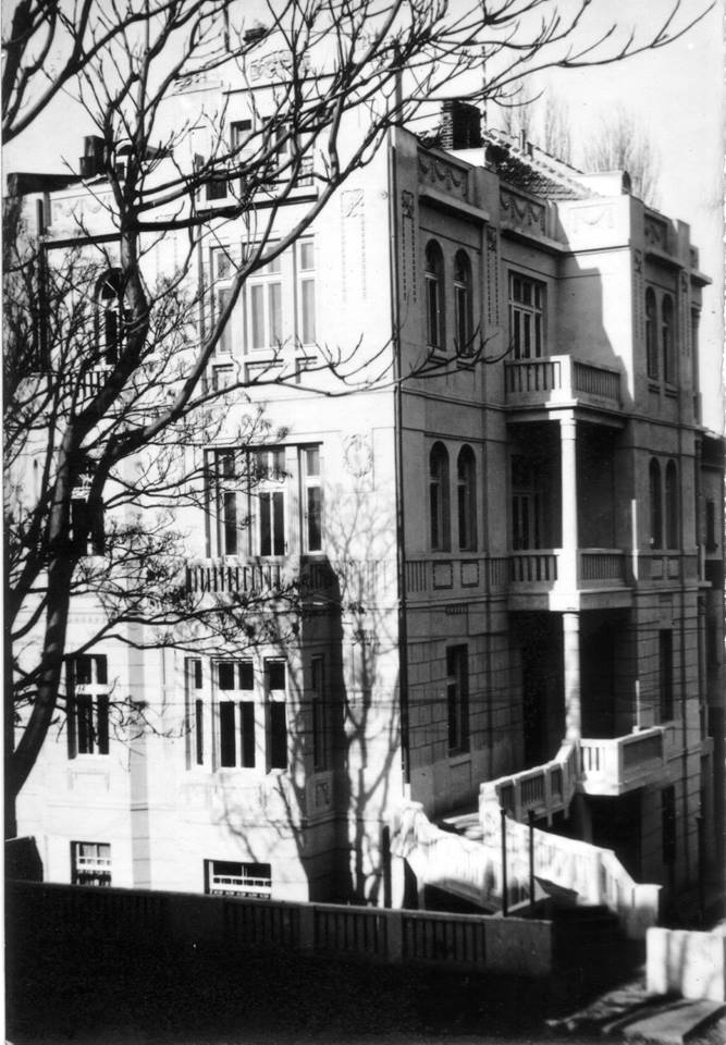 Палата Рубен - оригинална состојба